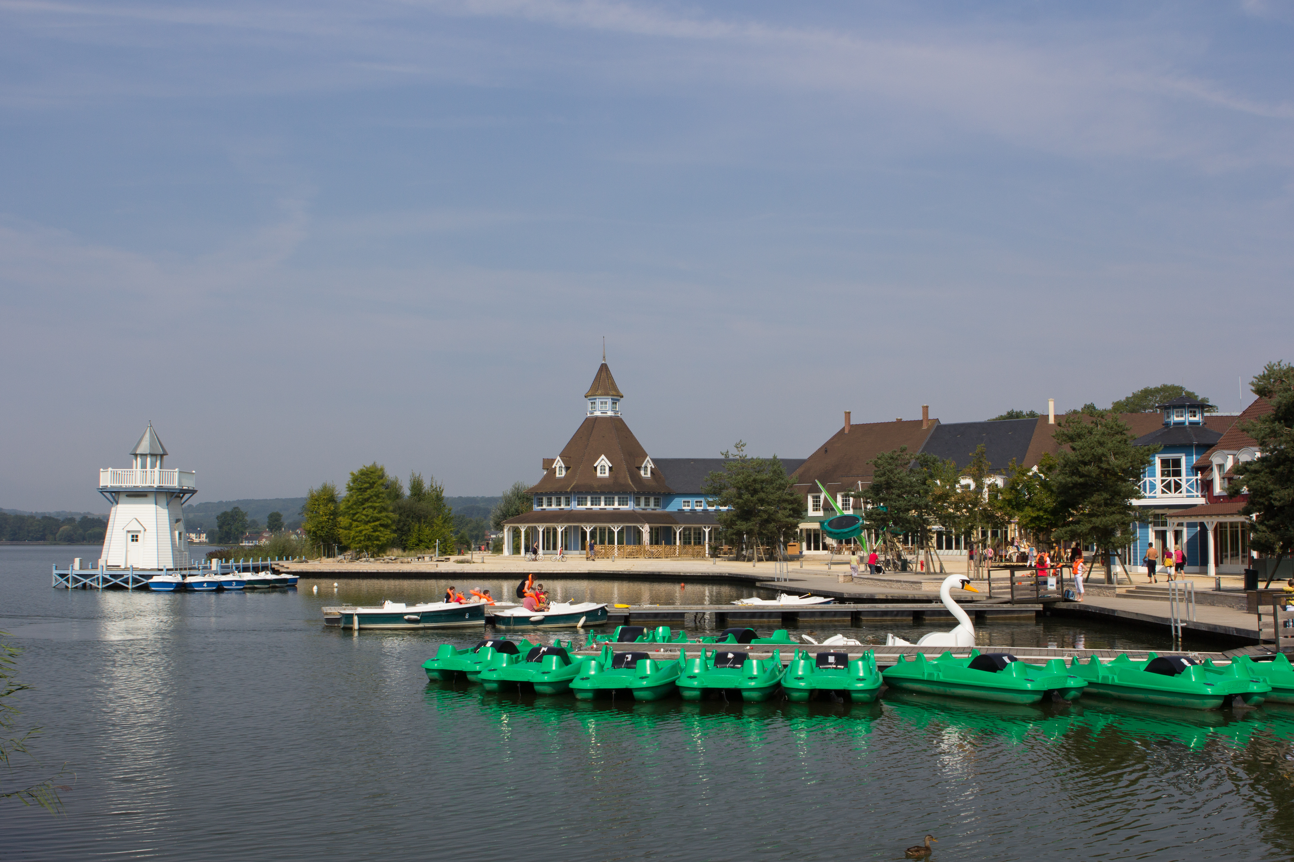 Center Parcs, Domaine du Lac d'Ailette, Chamouile, Aisne, France